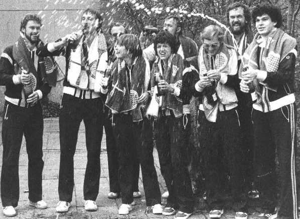 1. BC Beuel, Deutscher Mannschaftsmeister 1982